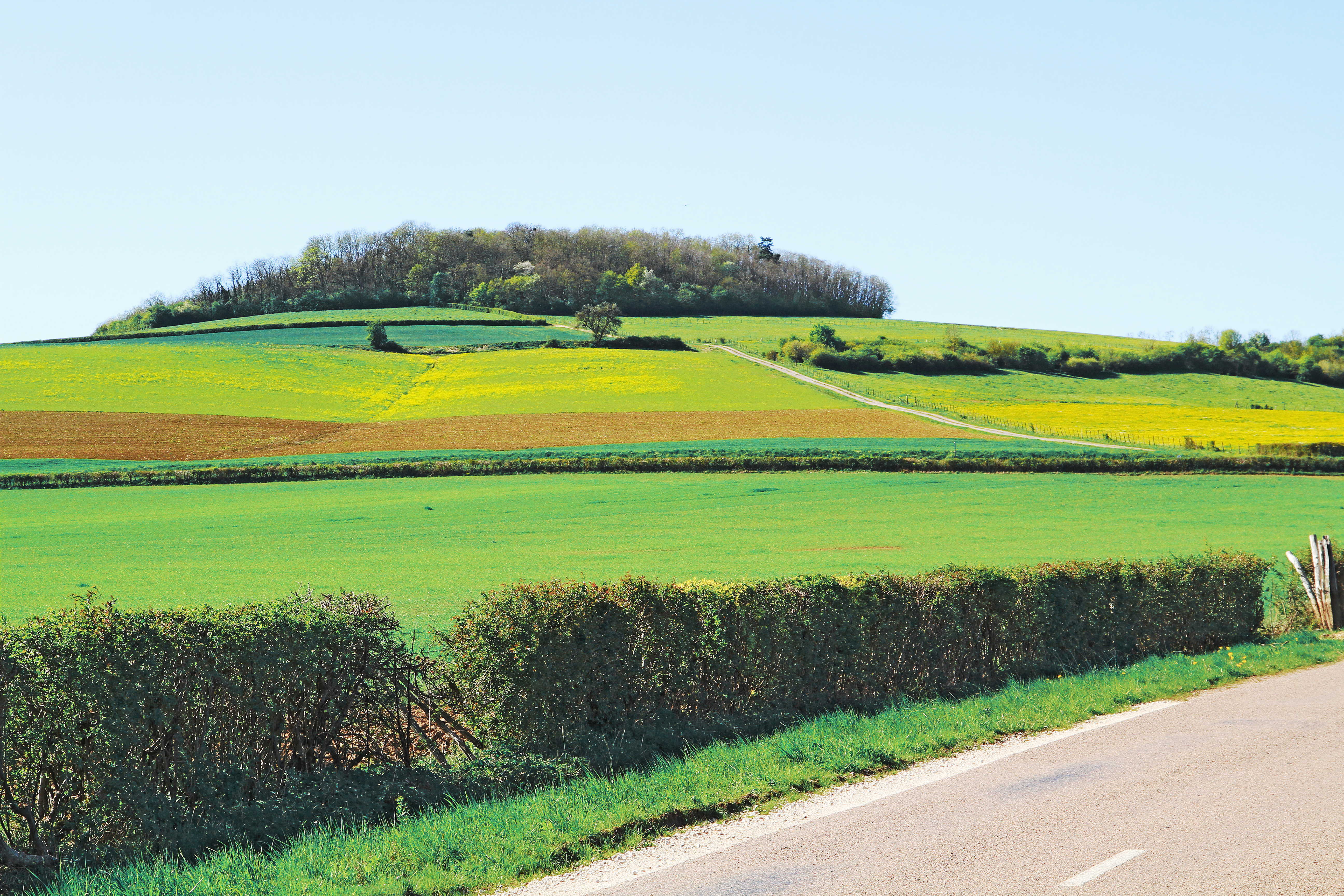 Le Mont-Rond sur les communes de Fontangy et la Motte-Ternant